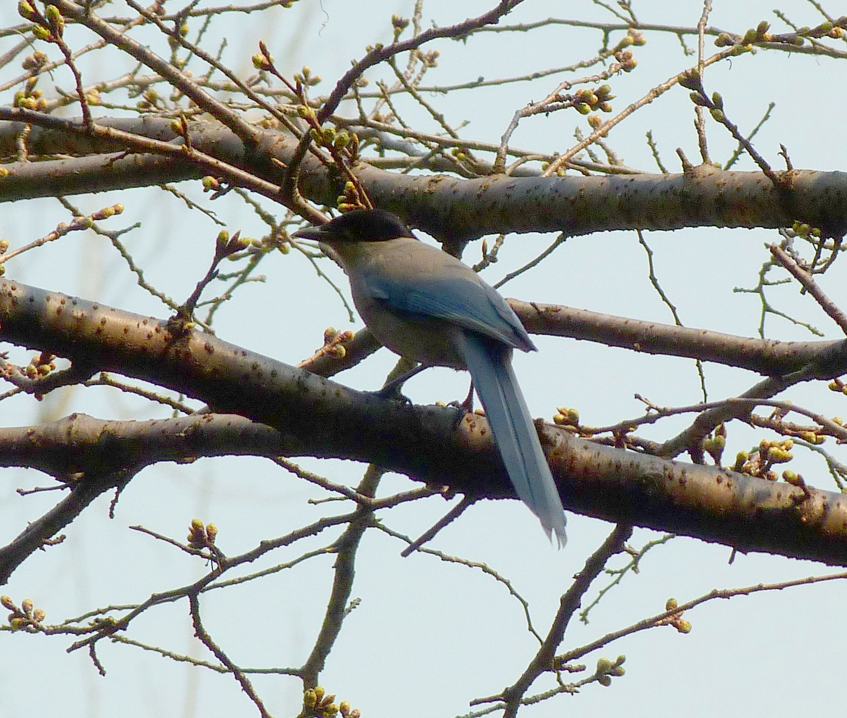 Azure-winged Magpie Cyanopica cyanus, Hibiya Park, Tokyo, Japan